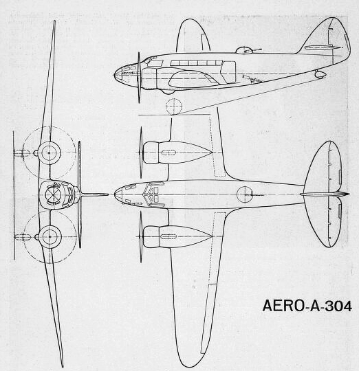 Aero A-304, 3D pohled (Letectví 1939, č. 1, s.7)